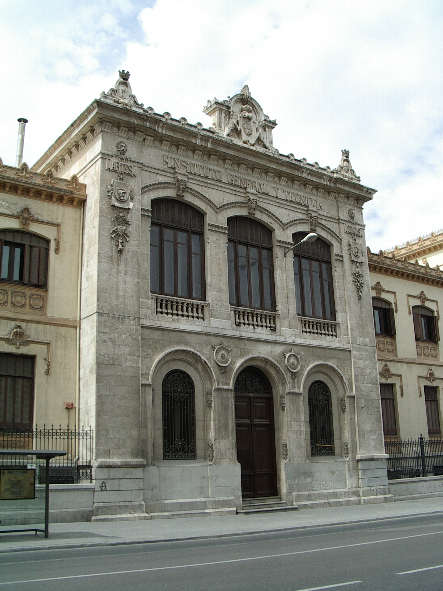 Fachada del Instituto Padre Suárez de Granada.